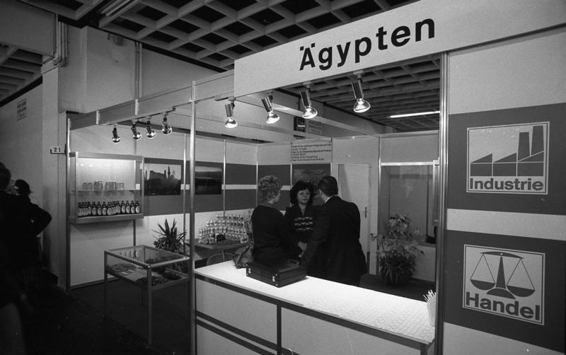 ANUGA 1977 in Köln (Allgemeine Nahrungs- und Genussmittel-Ausstellung) Ausstellungsstände Ägypten